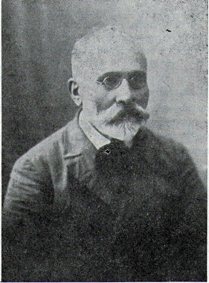 Петар Данилович Драганов снимен во Комрат една година пред смртта ( 1927 година )